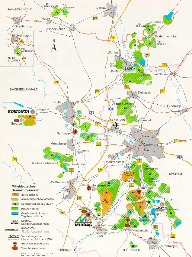 Mitteldeutsches Braunkohlerevier Tagebaue (LMBV 1998)